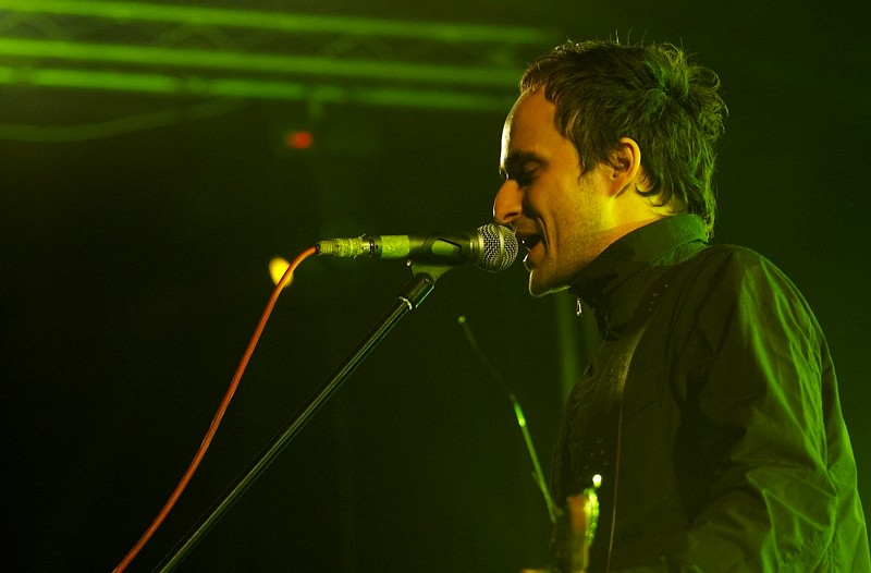 Myslovitz